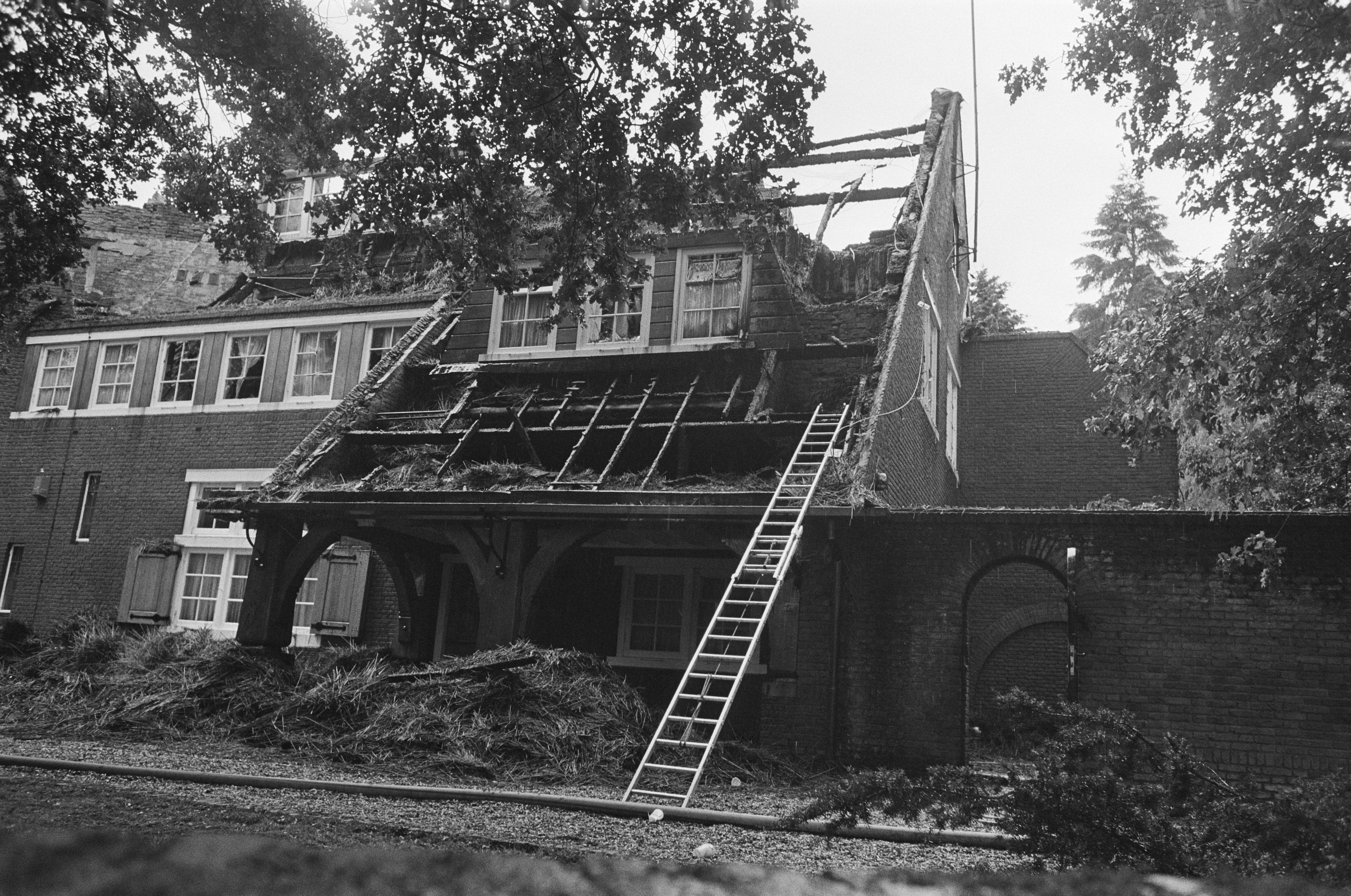 Collectie / Archief : Fotocollectie Anefo Reportage / Serie : [ onbekend ] Beschrijving : Villa van Menten in Blaricum deels door brand verwoest; door verbrande villa in Blaricum Datum : 18 juli 1977 Locatie : Blaricum Trefwoorden : VILLAS, branden, oorlogsmisdadigers Fotograaf : Verhoeff, Bert / Anefo Auteursrechthebbende : Nationaal Archief Materiaalsoort : Negatief (zwart/wit) Nummer archiefinventaris : bekijk toegang 2.24.01.05 Bestanddeelnummer : 929-2726